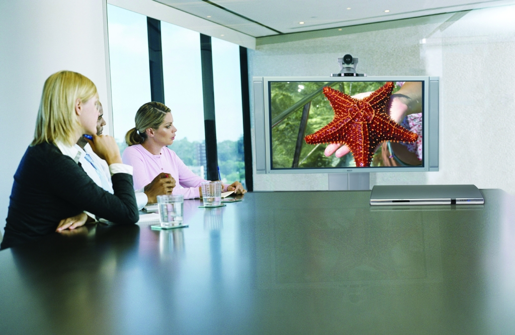 видеоконференция на базе группового HD терминала Aethra Vega X7